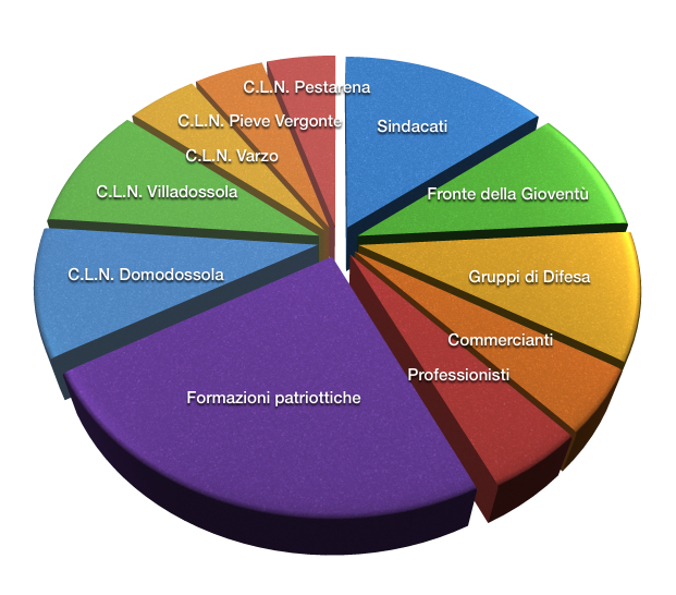 Composizione Consiglio Popolare di Governo (Giunta provvisoria di Governo di Domodossola e della Zona liberata) della Repubblica dell'Ossola